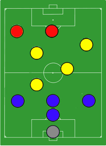 ==catenaccio